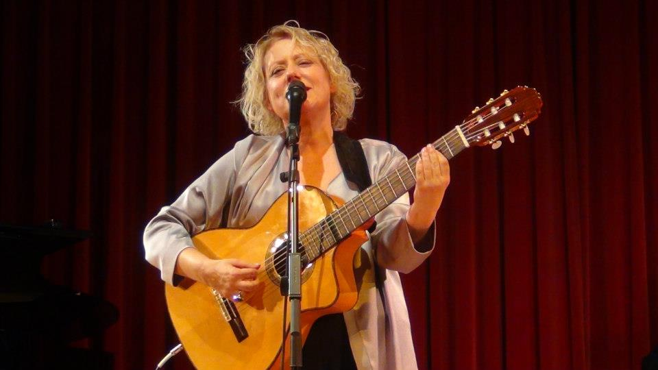 Marina Rossell en el Festival Barnasants 2013